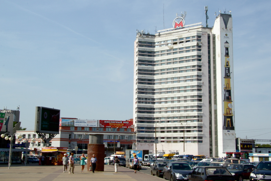 Nizhny Novgorod (Нижний Новгород)